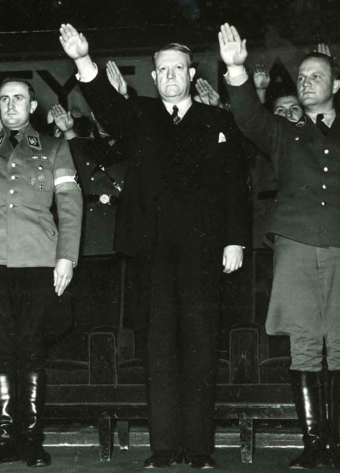 Bildetittelen viser til feil arrangement. Ifølge Aftenposten mandag 3. februar 1941 viser bildet «kst. statsråd Axel Stang, riksungdomsfører Axmann, Nasjonal Samlings fører, Vidkun Quisling, stellvertretender Gauleiter Wegener og kst. statsråd Hagelin [utenfor bildekanten her]» under «det store tysk-norske ungdomsmøte» i Colosseum lørdag 1. februar 1941. Avisa skriver ellers blant annet dette: «N. S.-ungdom fra alle kanter av landet hadde sammen med sine tyske kamerater fylt Colosseum til siste ståplass ved den store kameratskapsaften som Nasjonal Samling hadde arrangert lørdag. Efter fakkeltoget gjennem byen strømmet N. S.-ungdommen inn under Colosseums høie kuppelhvelv. På podiet satt det udmerkede Hitler-Jugend-orkester Niedersachsen, veggene var smykket med Hitler-Jugends rødhvit flagg og N. S. solkors på grønn flaggduk. På balkongen stod det med kjempebokstaver «Med Norge og Tyskland for Storgermania».» Quisling og Tysklands riksungdomsfører Artur Axmann holdt taler i Colosseum. Axmann åpnet dagen etter (søndag 2. februar 1941) Hitler-Jugend-utstillingen «Tysklands ungdom» i Håndverkeren i Oslo kl. 11. Til stede der var blant andre «generaloberst v. Falkenhorst, admiral Bøhm, og en rekke andre representanter for forsvarsmakten. Videre så man Nasjonal Samlings fører Vidkun Quisling og de konst. statsråder Lunde og Skancke.» (Det 8. Riksmøte fant sted 25.-27.9.1942) fotograf: Presse- og propagandaav. Billed- og filmktr. RA/PA-0781/Fa/0001/0025 NB! UTSNITT 1151 Nasjonal Samling, forkortet NS, var et norsk politisk parti som ble grunnlagt av Vidkun Quisling i 1933 og ble oppløst ved frigjøringa i 1945. Ideologisk fulgte partiet den tyske nasjonalsosialismen, og NS ble støtteorganisasjon for den tyske okkupasjonsmakta i Norge under andre verdenskrig.